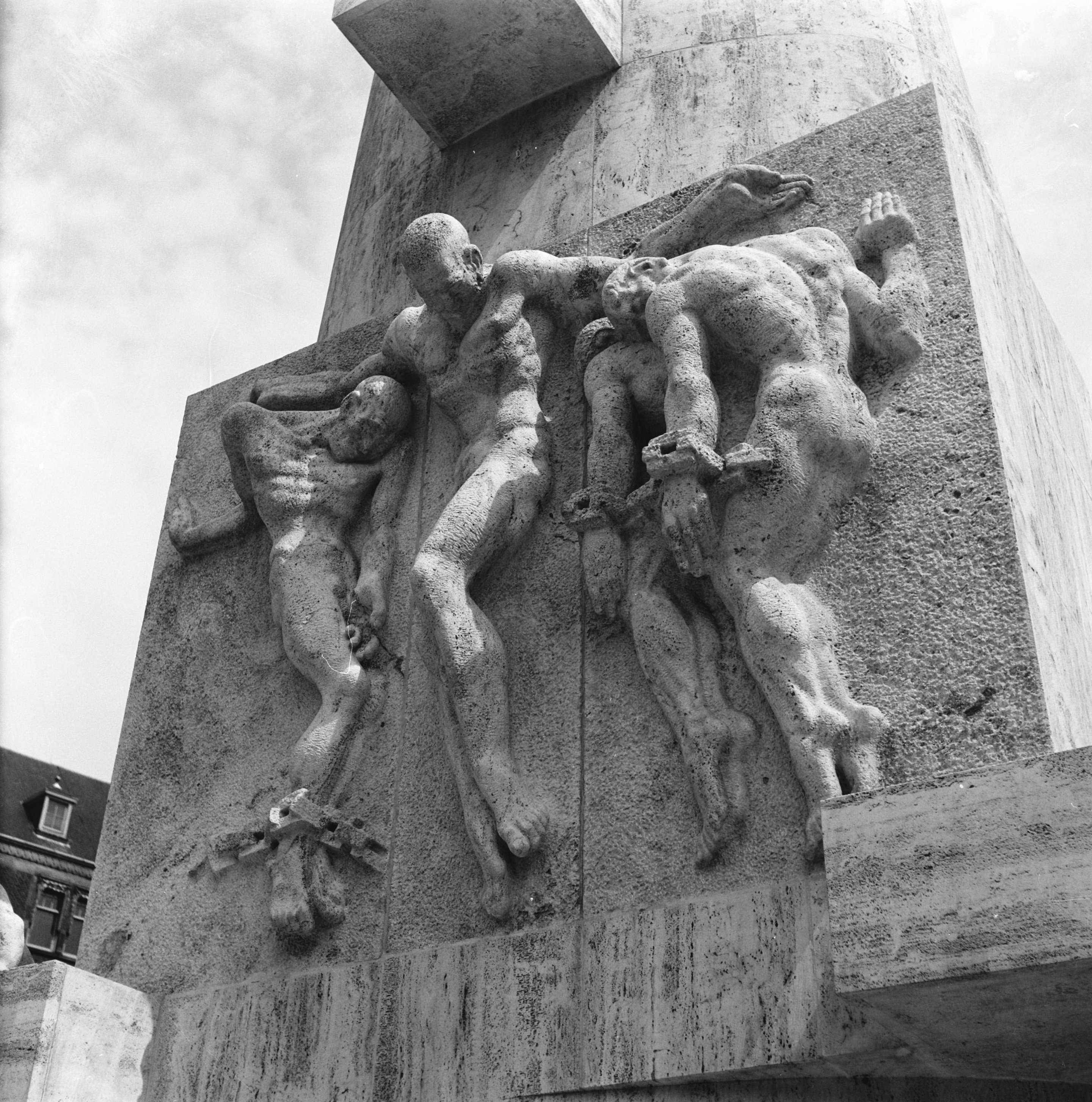 Collectie / Archief : Fotocollectie Anefo Reportage / Serie : [ onbekend ] Beschrijving : Fragmenten van Nationaal Monument Amsterdam Datum : 31 mei 1956 Locatie : Amsterdam, Noord-Holland Trefwoorden : Fragmenten Instellingsnaam : Nationaal Monument Fotograaf : Pot, Harry / Anefo Auteursrechthebbende : Nationaal Archief Materiaalsoort : Negatief (zwart/wit) Nummer archiefinventaris : bekijk toegang 2.24.01.03 Bestanddeelnummer : 907-7904